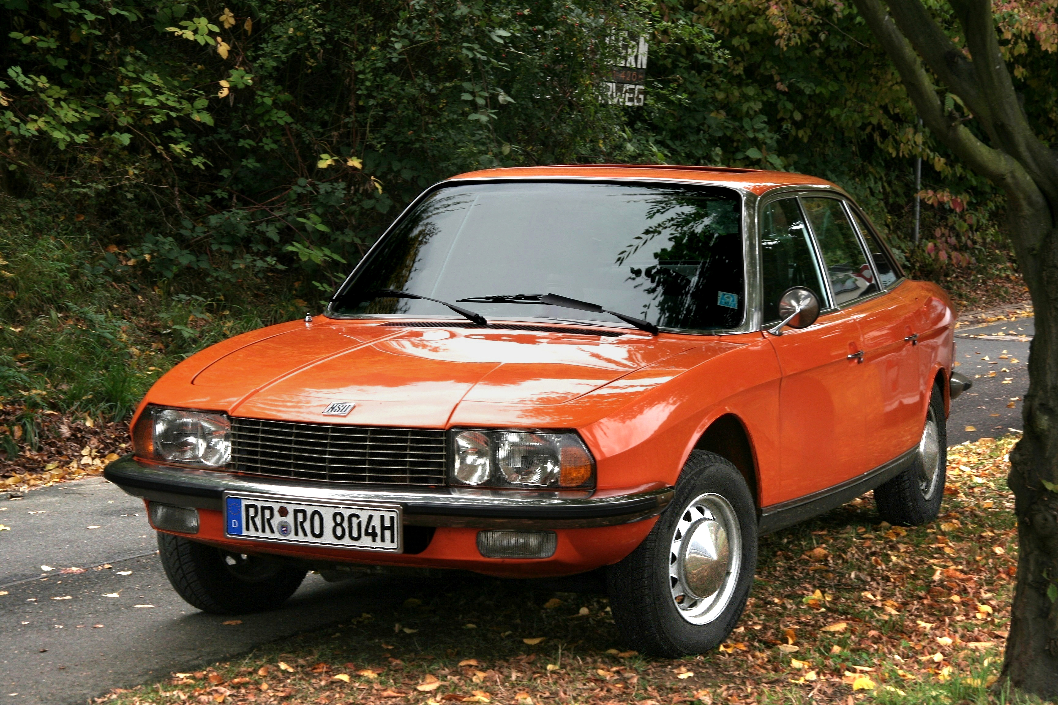 NSU Ro 80 (Phantasiekennzeichen)